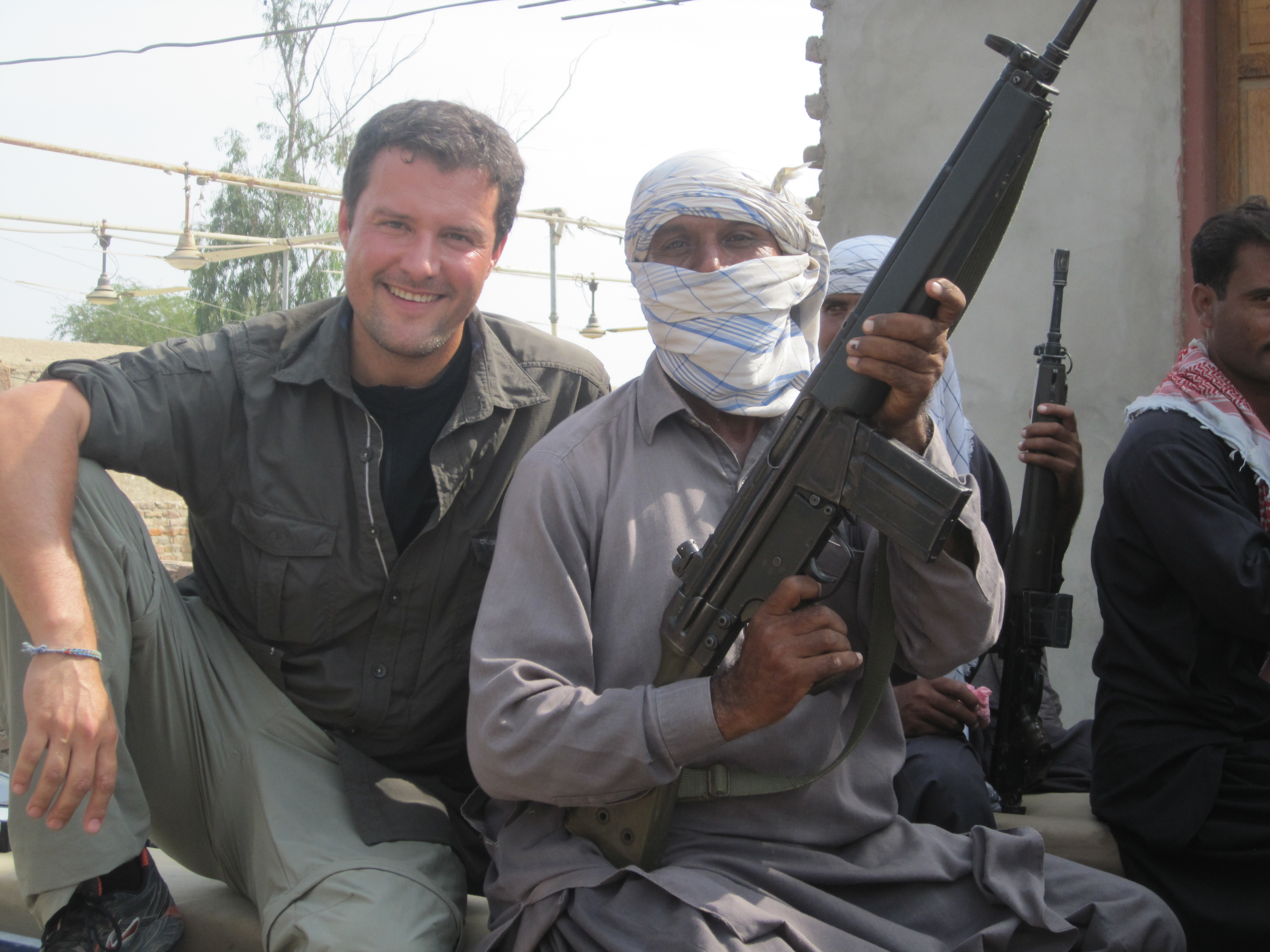 Christian Staudinger mit Bodyguards in Pakistan